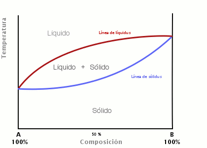 Diagrama de fase binario, solubilidad total